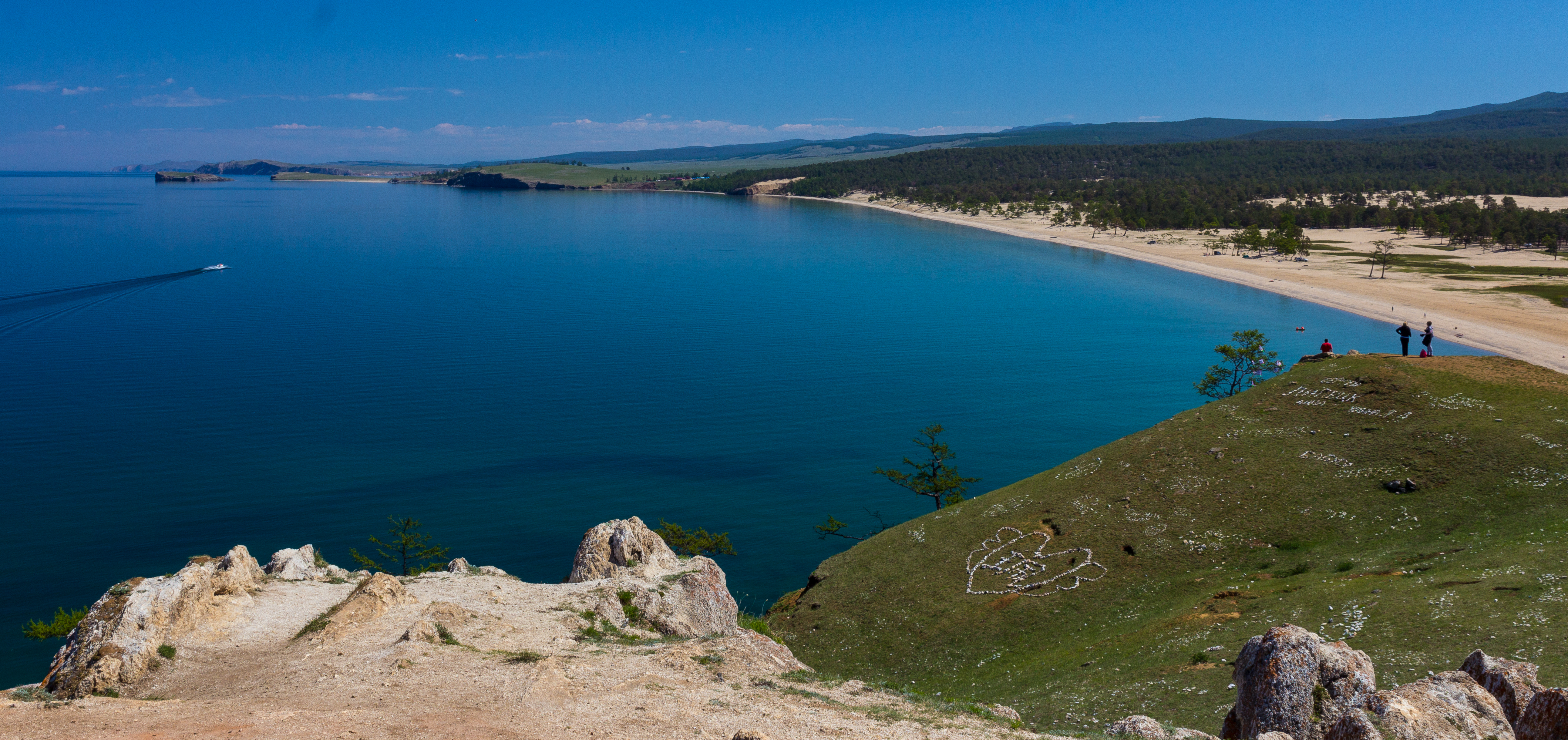 2014-06-13_07-38-36_IMG_6874-36-2-2